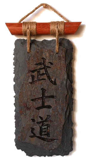 "Бусидо". Японское написание, высеченное на камне.